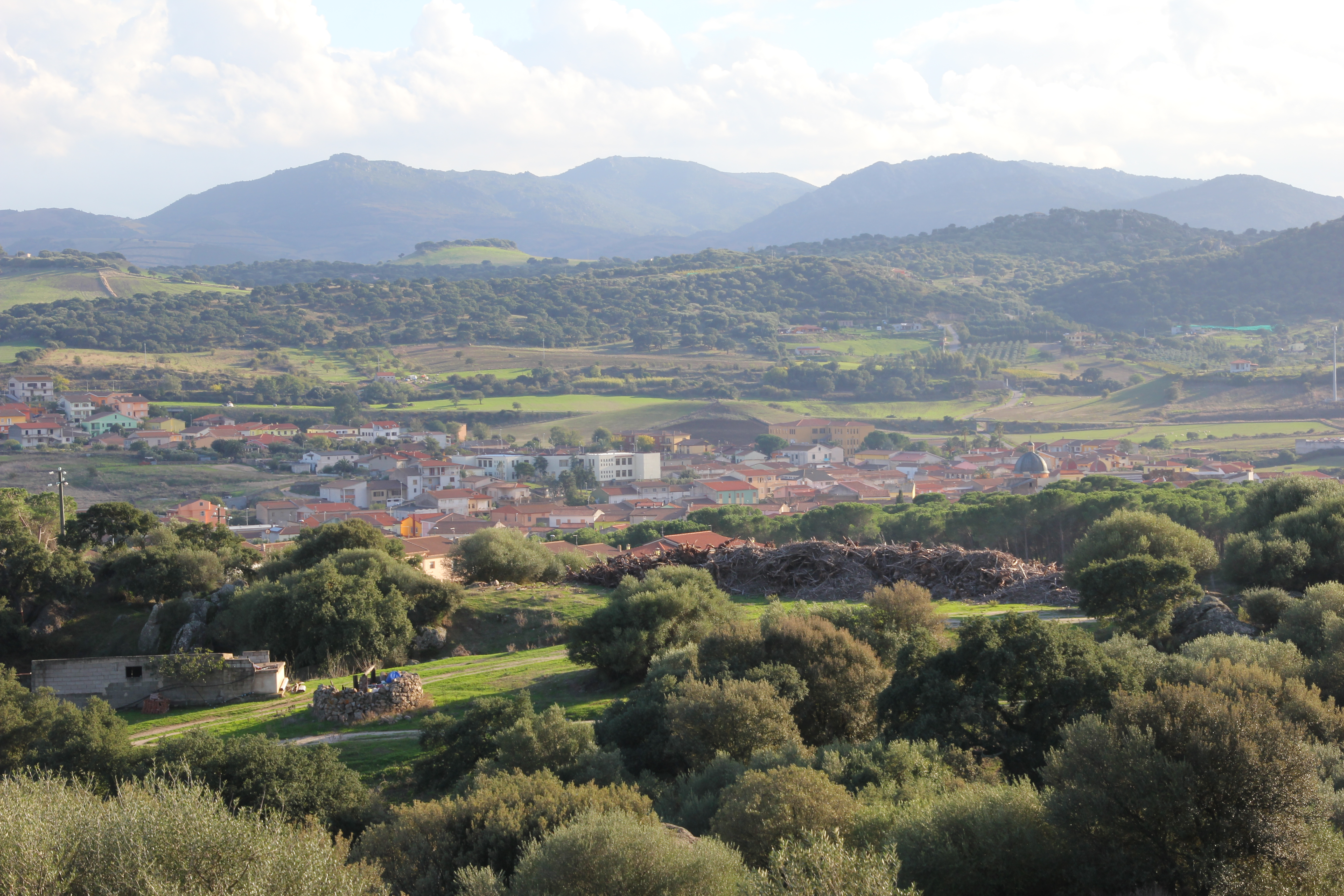 Oschiri - Panorama